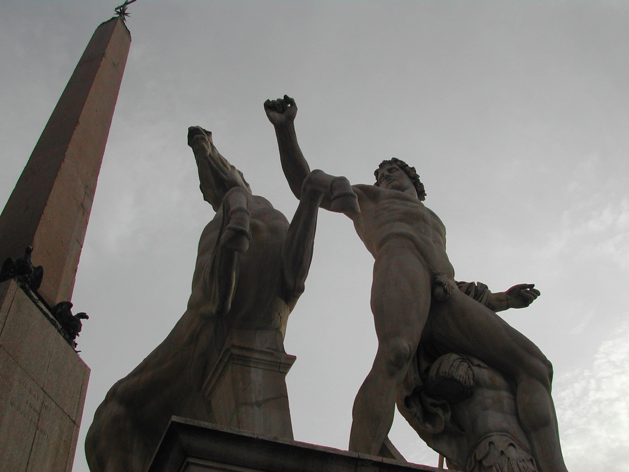 Roma, piazza del Quirinale: Dioscuro e obelisco by Lalupa